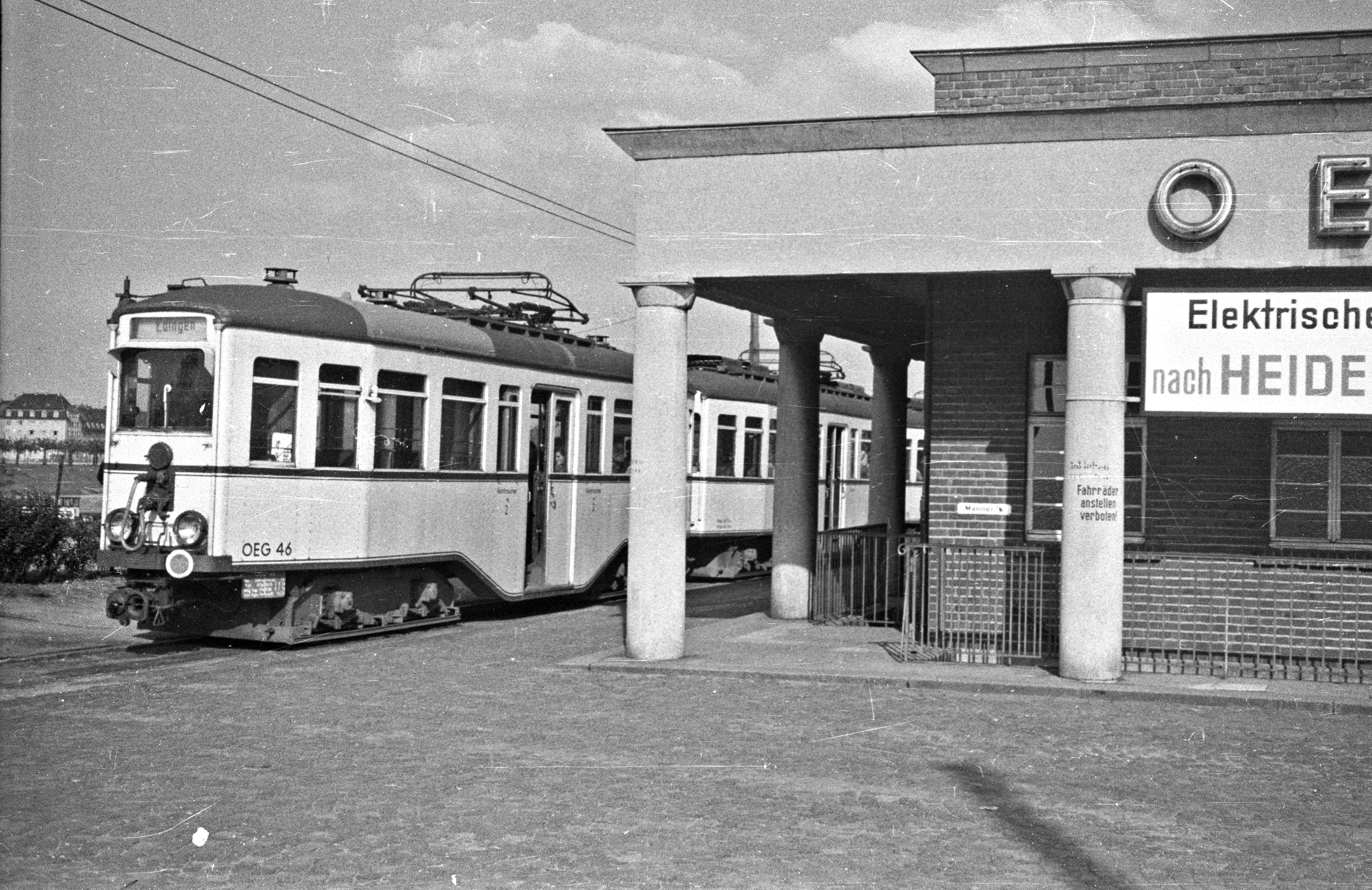 OEG-Straßenbahn am Bahnhof nahe der Kurpfalzbrücke